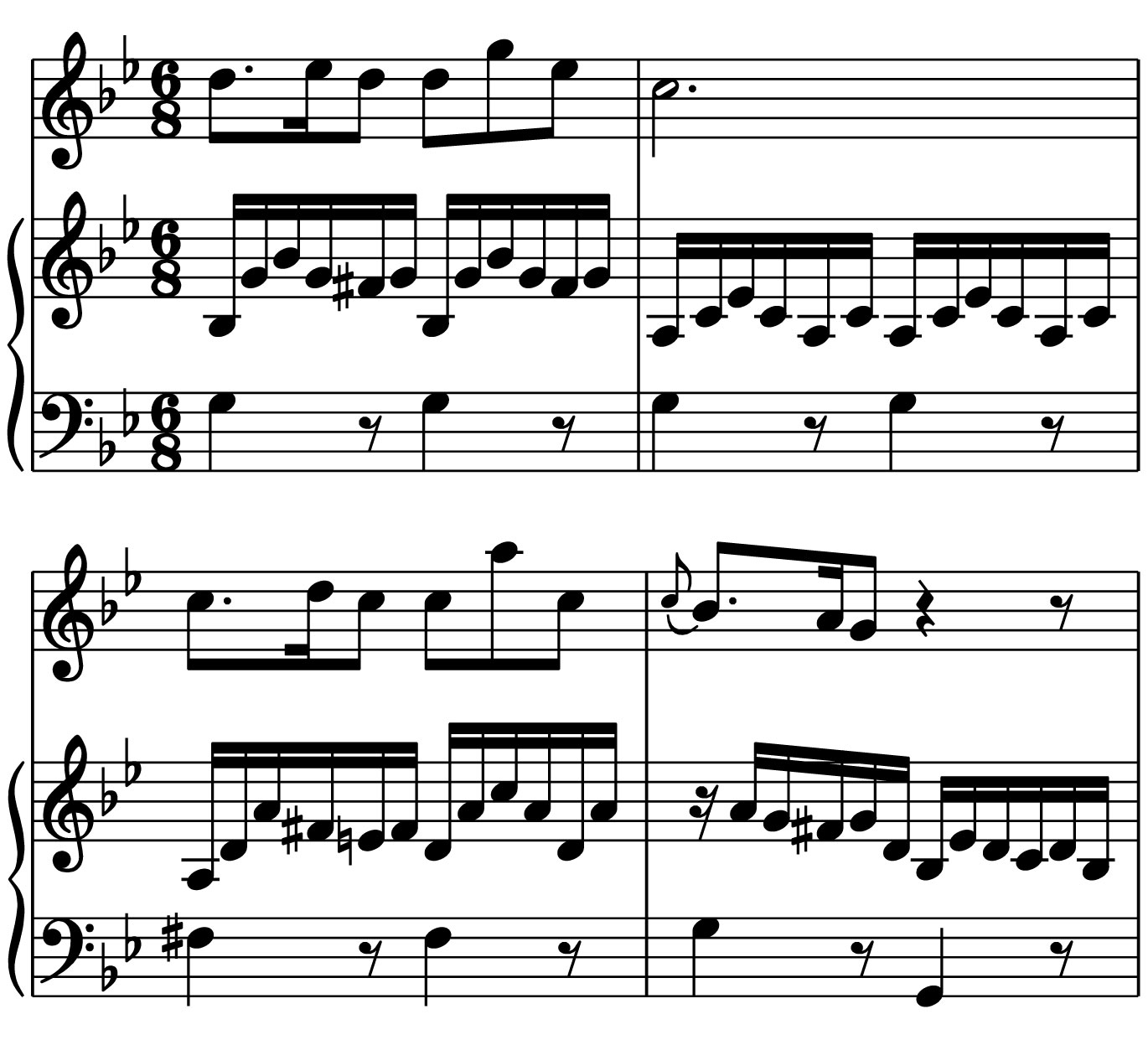 Бах. Соната для флейты, BWV 1083, ч.2 (фрагмент)